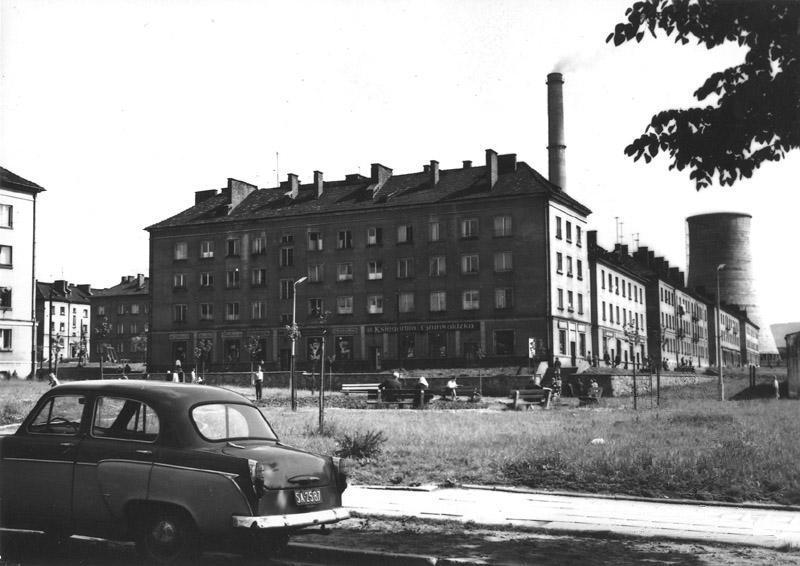 Osiedle Grunwaldzkie w latach 60. - na pierwszym planie skwer przy ul. Rychlińskiego, dalej blok przy ul. PCK 4.